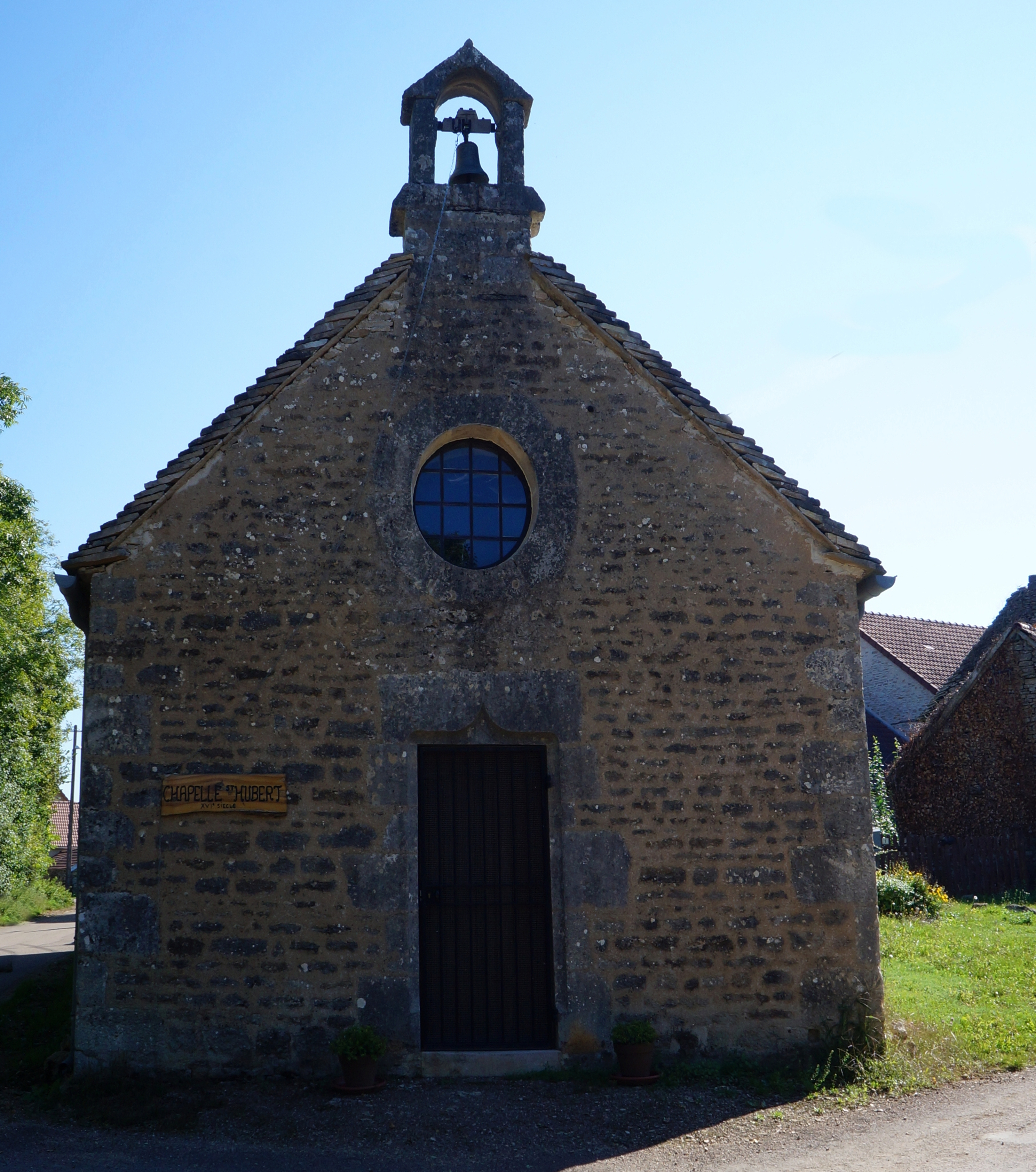 Turcey – Chapelle Saint-Hubert-de-la Rochotte. Côte-d'Or Bourgogne-Franche-Comté.- Côte-d'Or Bourgogne-Franche-Comté.- France